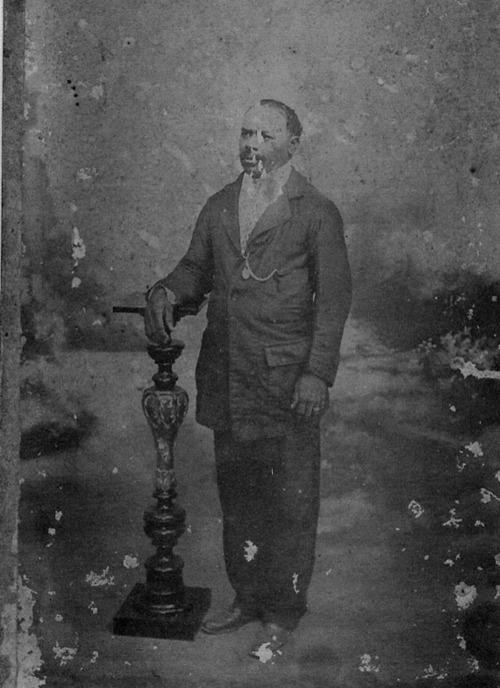 Poeta popular e cantador João Melchíades Ferreira da Silva (1869-1933)